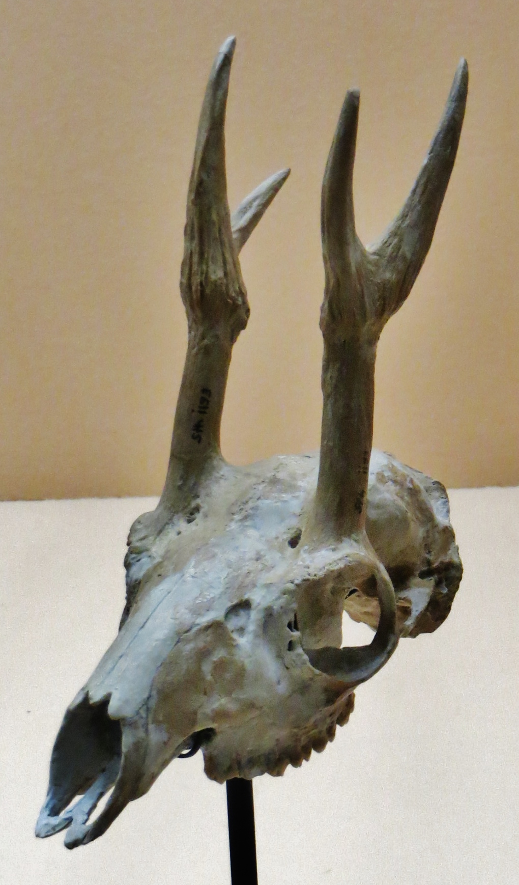 Fossil of Heteroprox- Took the picture at Natural History Museum, Basel